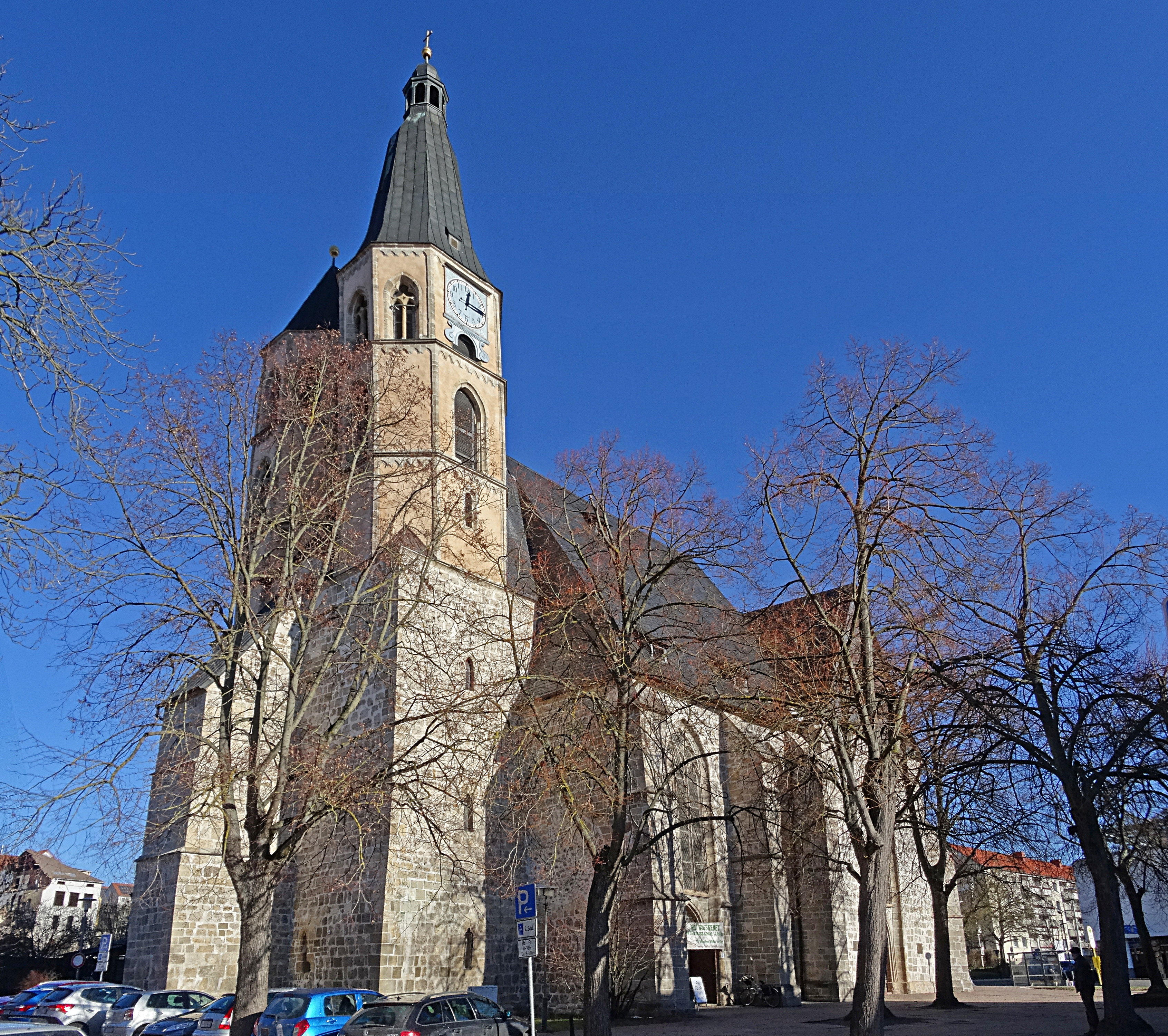 Stadtpfarrkirche St. Blasii (Nordhausen) mit dem schiefen Südturm (vorne)